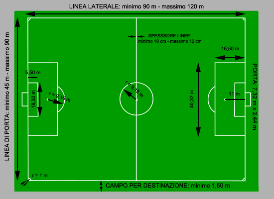 Misure di un campo da calcio regolamentare (Regolamento del Gioco del Cacio)